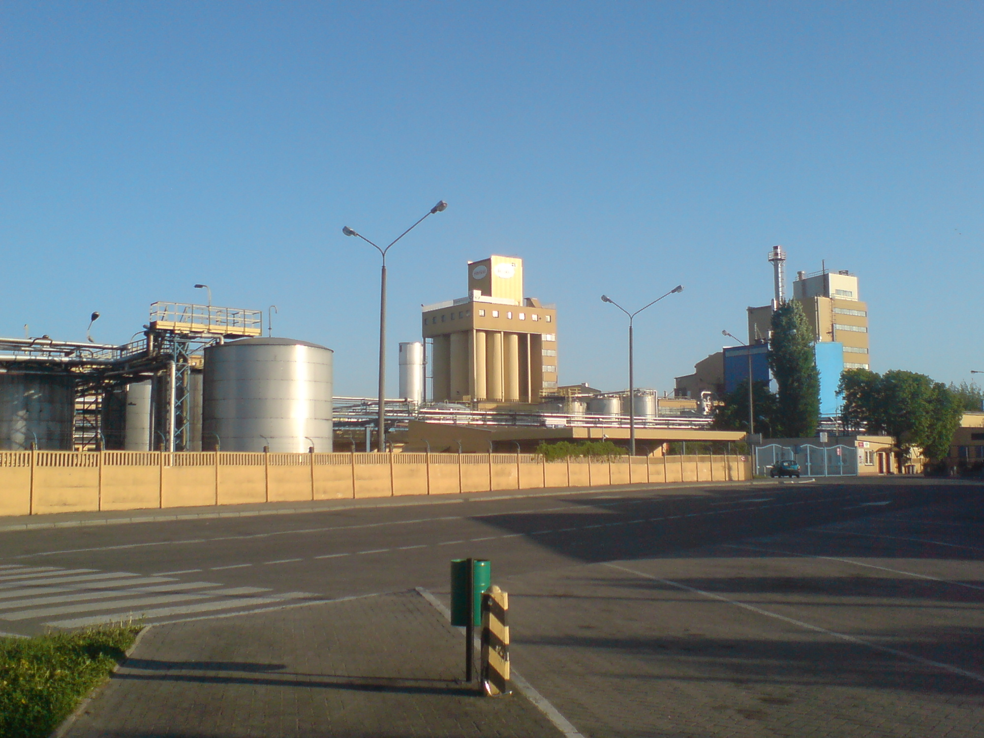 Fabryka Henkla w Raciborzu